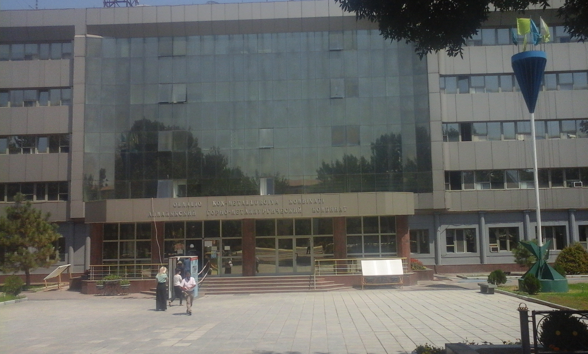 11 авгугста 2020 года. Алмалык